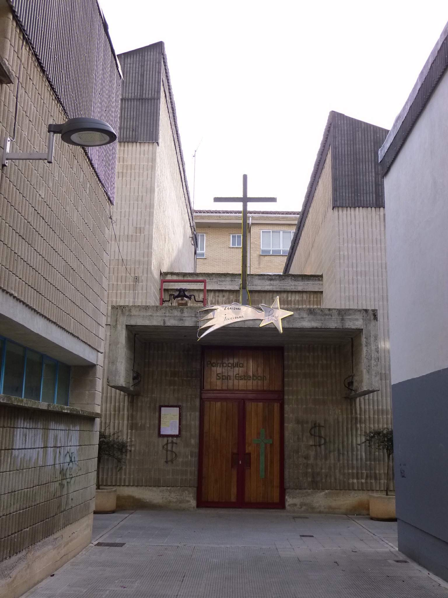 Iglesia de San Esteban (Berriozar, Navarra)